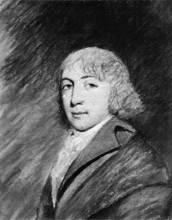 Drawing of Carlos Martínez de Irujo y Tacón, Marqués de Casa Irujo.